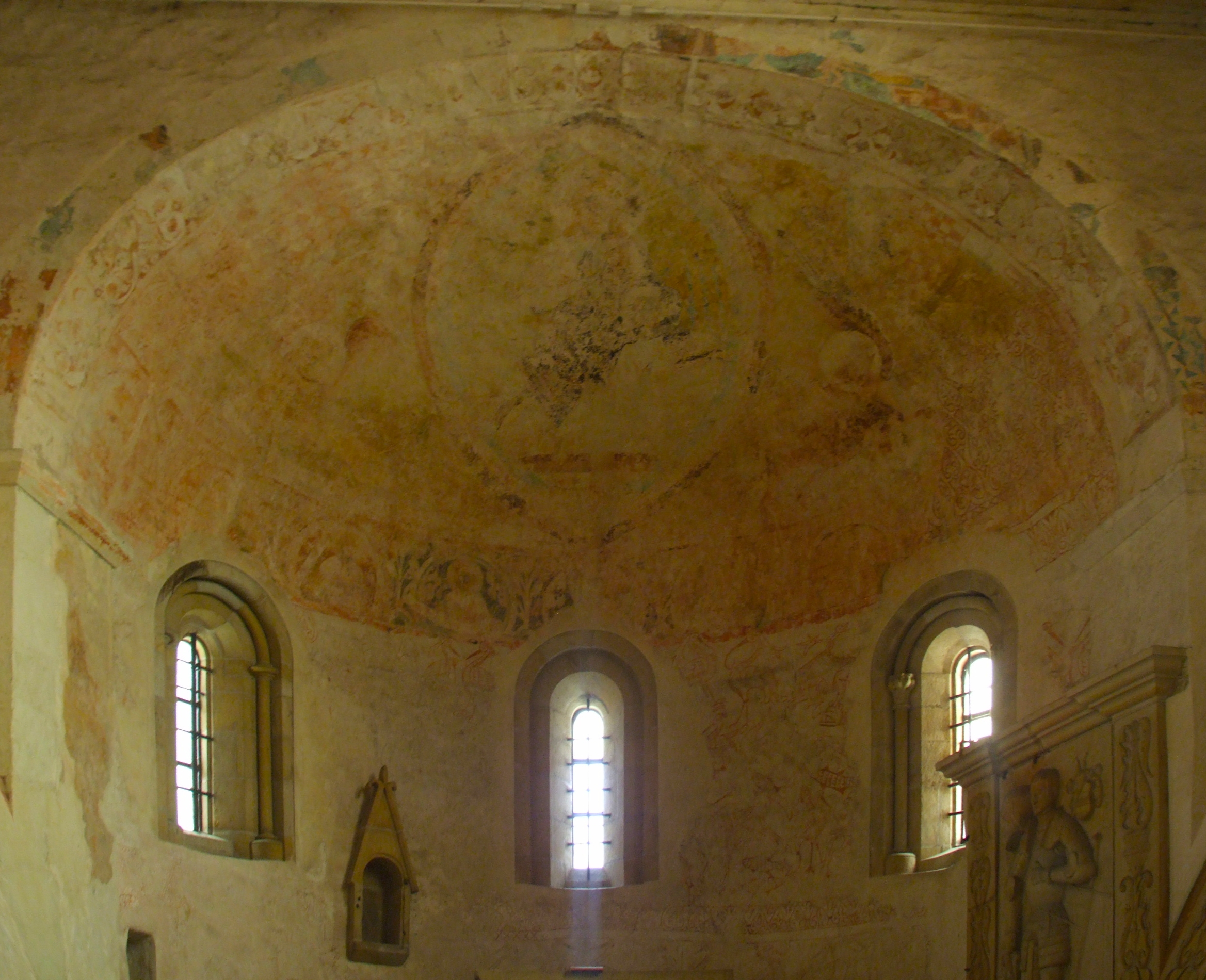 Schönau an der Katzbach (heute Świerzawa) - Kirche der hlg. Johannes und Katharina von Alexandrien. Apsis